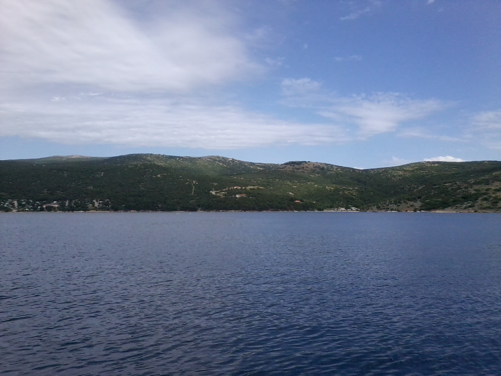 Uvala Konobe na jugozapadu otoka Krka, Hrvatska; slikano s mora. Lijevo se jasno vidi naturistički kamp "Konobe", ali se isti pruža i do središnje plaže kampa koja je na desnoj strani slike. Na sredini slike su zgrade trgovine i, ponad nje, recepcije kampa. Iznad recepcije desno je brdo Kaslir. U lijevom gornjem kutu slike se vide najviši vrhovi otoka Krka jedan do drugog: Veli vrh (lijevo) i Obzova (desno).